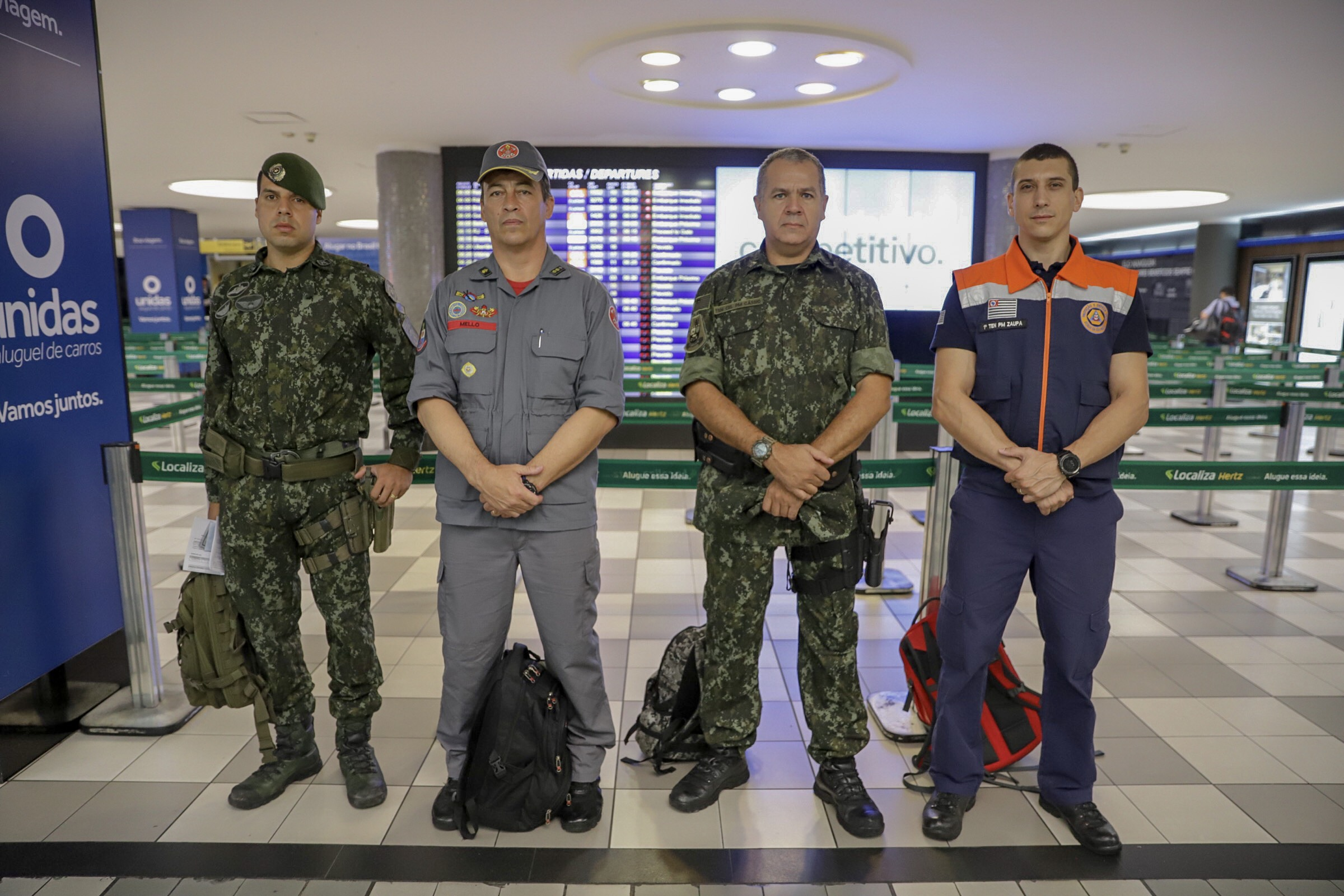 Embarque de oficiais dos bombeiros, GOE, polícia ambiental e defesa civil de SP para Brumadinho (MG) para prestar auxílio técnico no vazamento da barragem. Local: São Paulo/SP. Data: 28/01/2019. Foto: Governo do Estado de SP